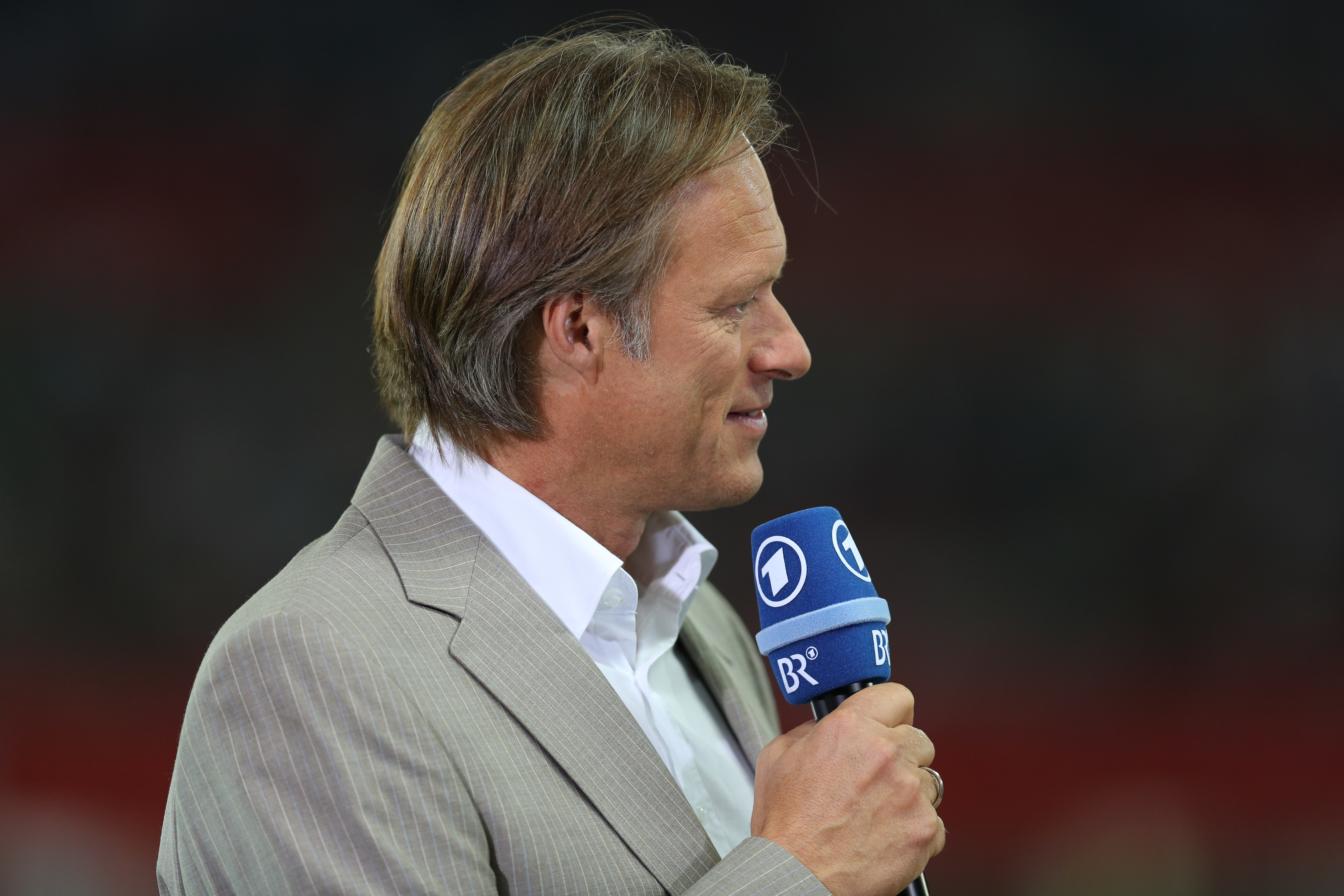 Fußball-Weltmeisterschaft 2014/Qualifikation (UEFA), Gruppe C, 11. September 2012, Österreich gegen Deutschland im Wiener Ernst-Happel-Stadion. The making of this work was supported by Wikimedia Austria. For other files made with the support of Wikimedia Austria, please see the category Supported by Wikimedia Österreich.